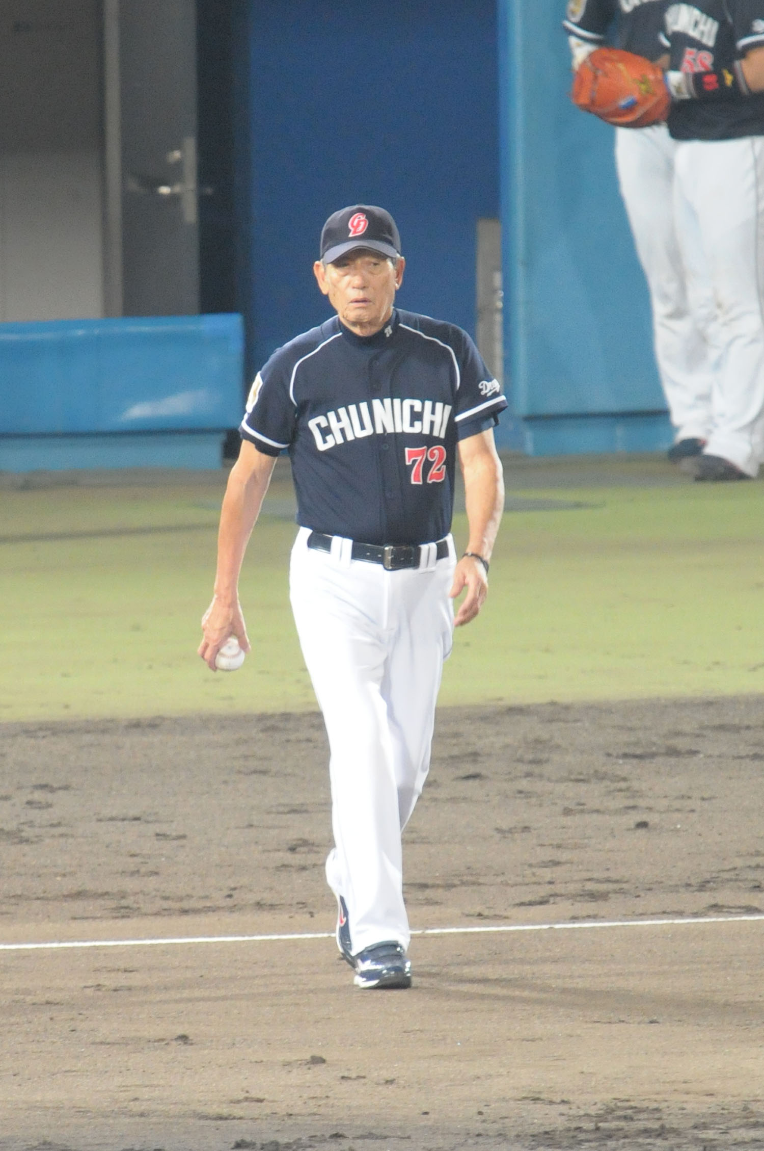 中日ドラゴンズ、権藤博コーチ。こまちスタジアムで。